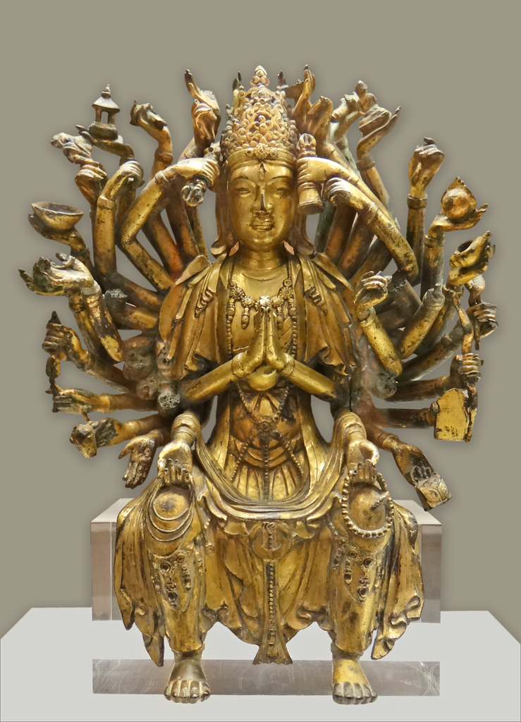 Guanyin, le Bodhissattva aux mille bras La forme féminine du bodhisattva Avalokiteshvara est Quan Âm appelée Guan Yin en Chine, XIè-XIIè siècle Chine Cuivre avec dorure Article de Wikipedia sur Guanyin l'album des représentations de Guanyin (photos dalbera) musée d'art asiatique de Dahlem (Berlin) La base de données des musées de Berlin